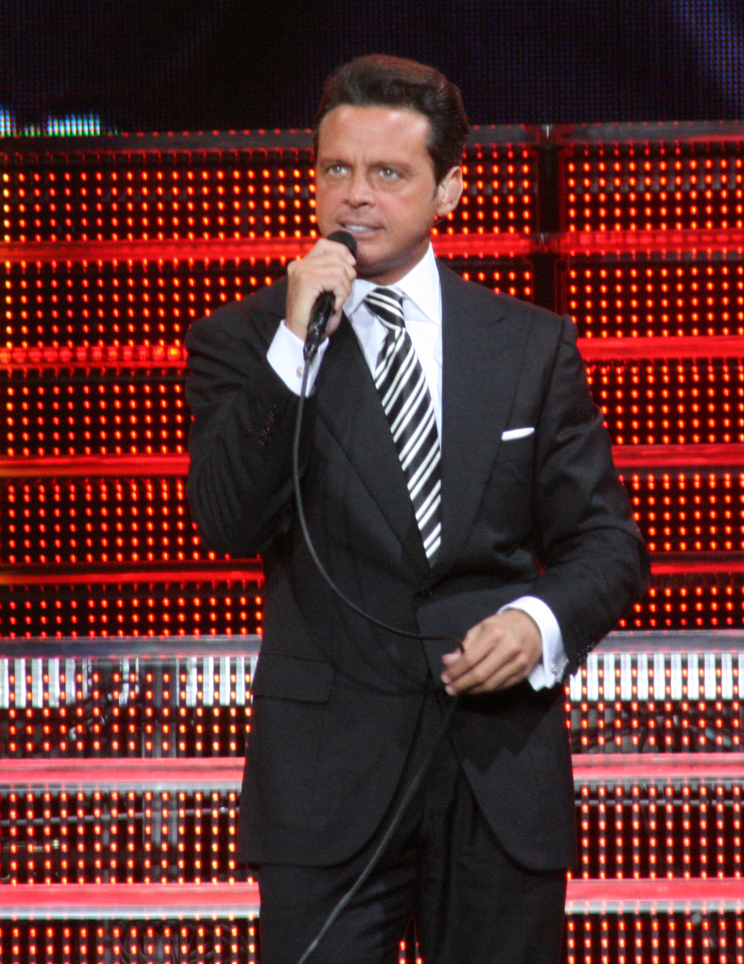 Luis Miguel cantando en un concierto.